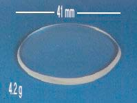 Brillenglasrohling